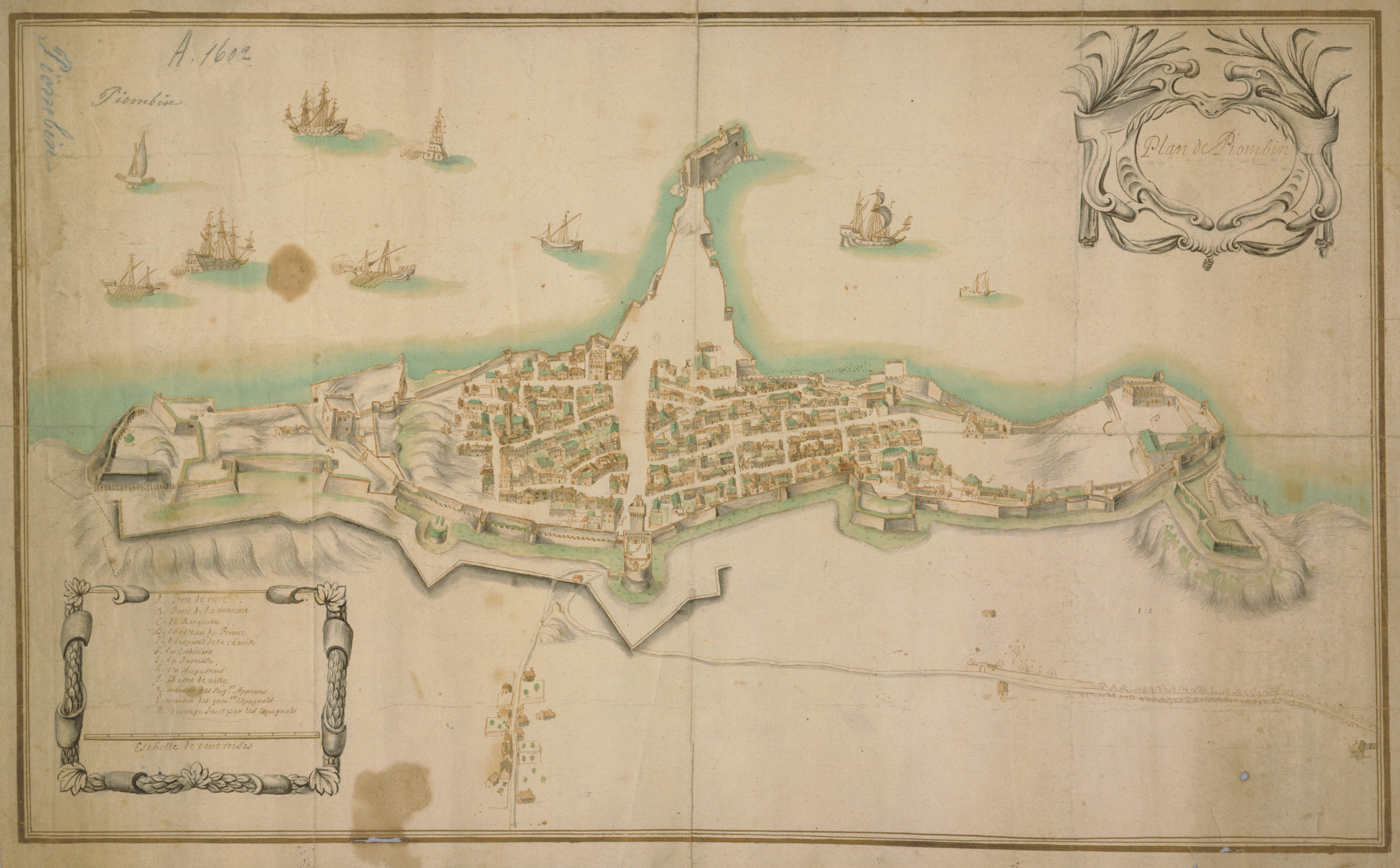 Plan_de_la_ville_et_des_fortifications_de_Piombino,_XVIIIe_siècle